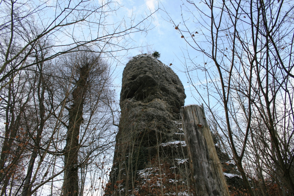 Tüfels-Chäller bi Bade AG, Schwiiz